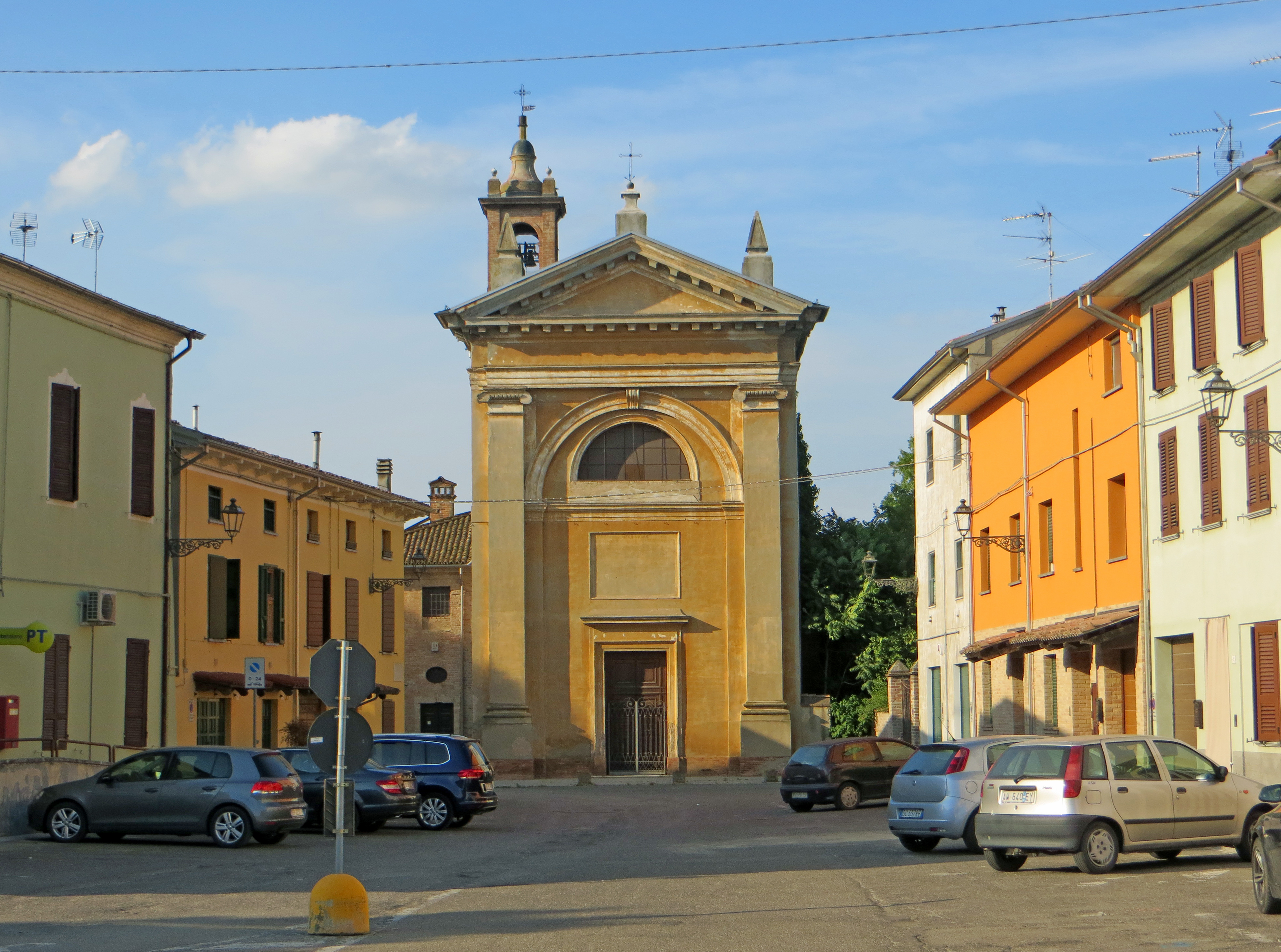 Chiesa di Santa Maria Annunziata (Busseto) - facciata